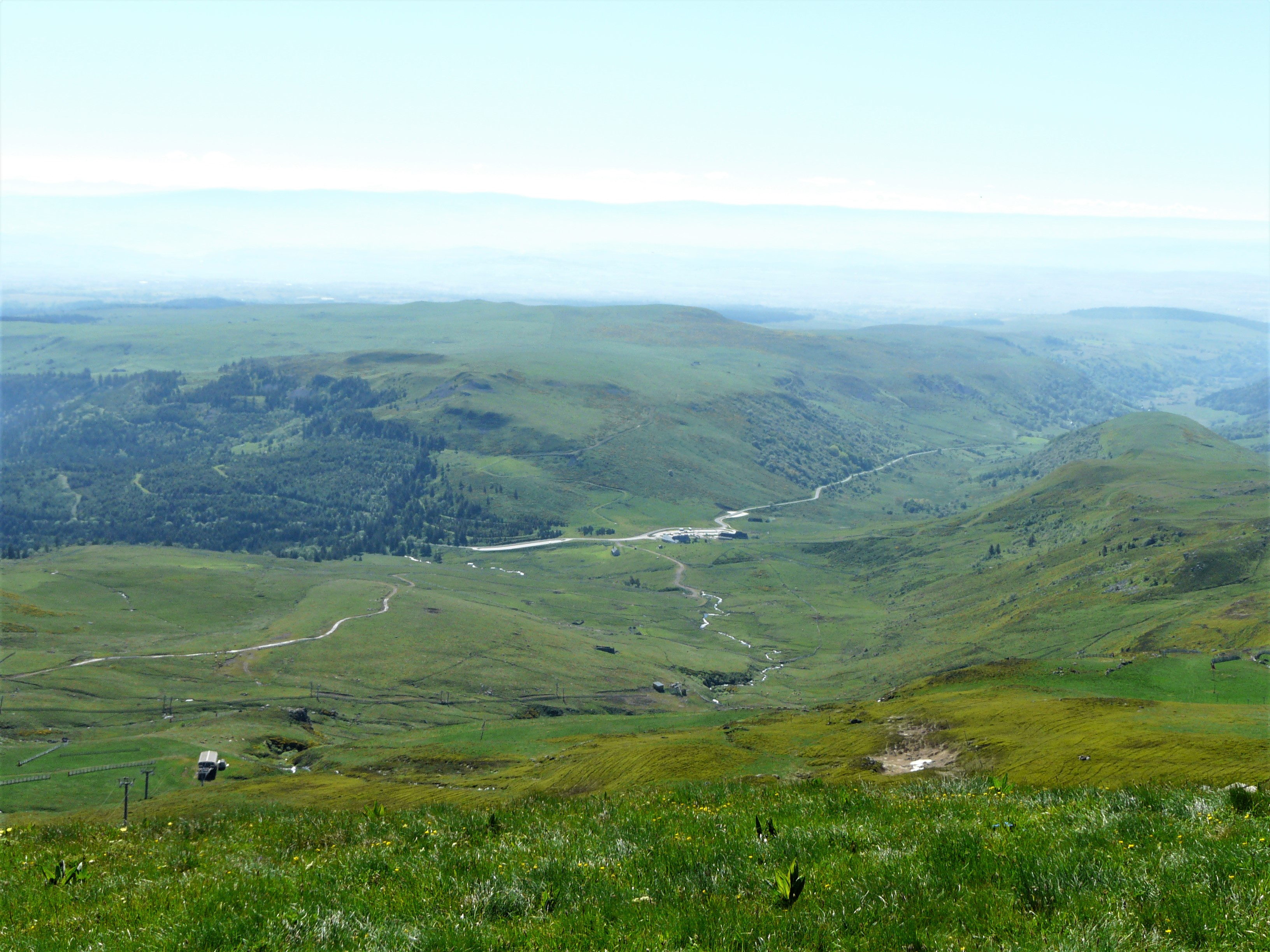 Le col de Prat de Bouc vu depuis le plomb du Cantal.